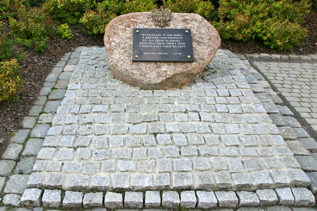 Prężynka – wieś w Polsce położona w województwie opolskim, w powiecie prudnickim, w gminie Lubrza.